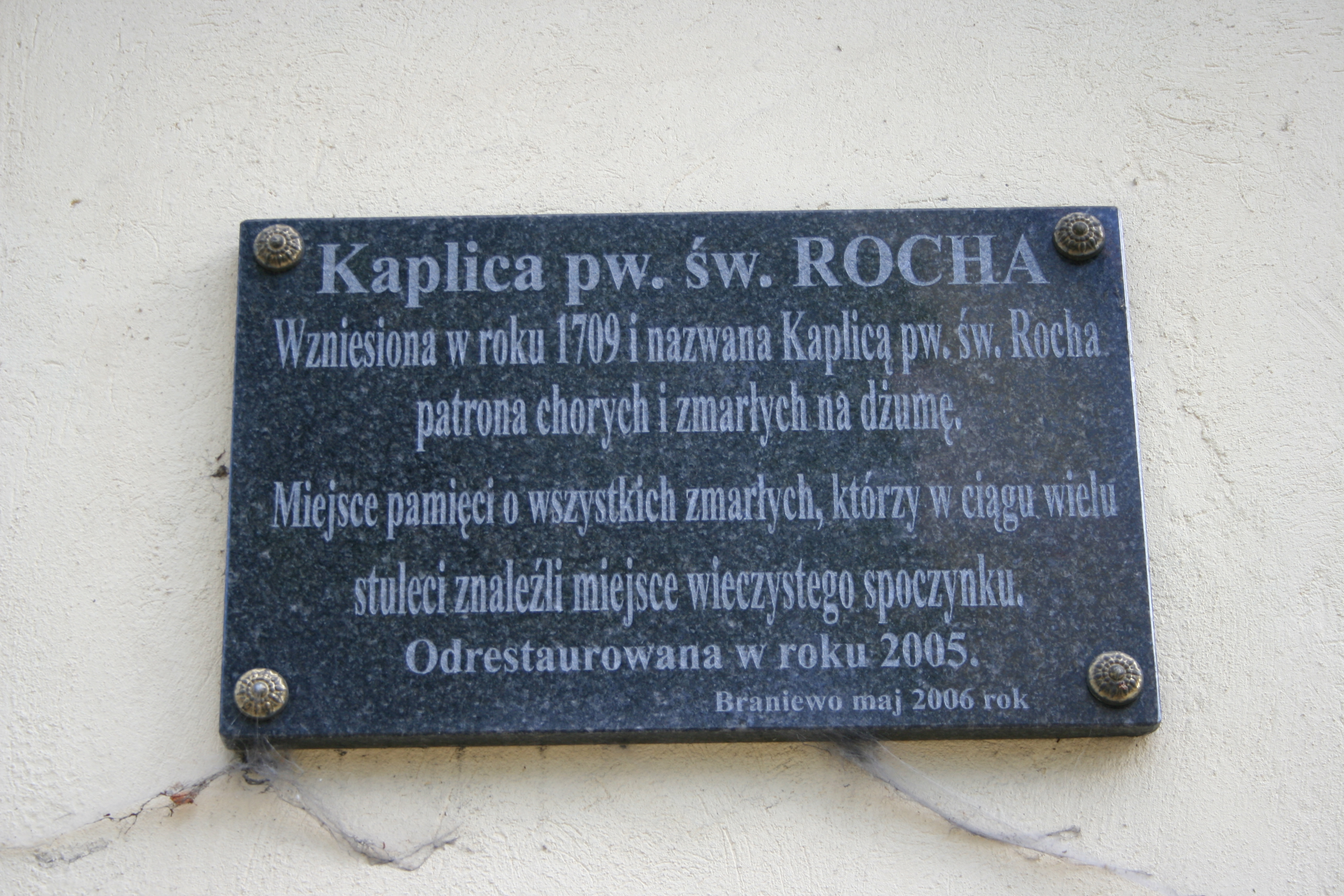 Braniewo, kaplica pw. św. Rocha, 1711